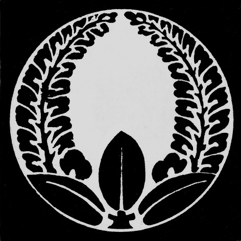 石持に上り藤